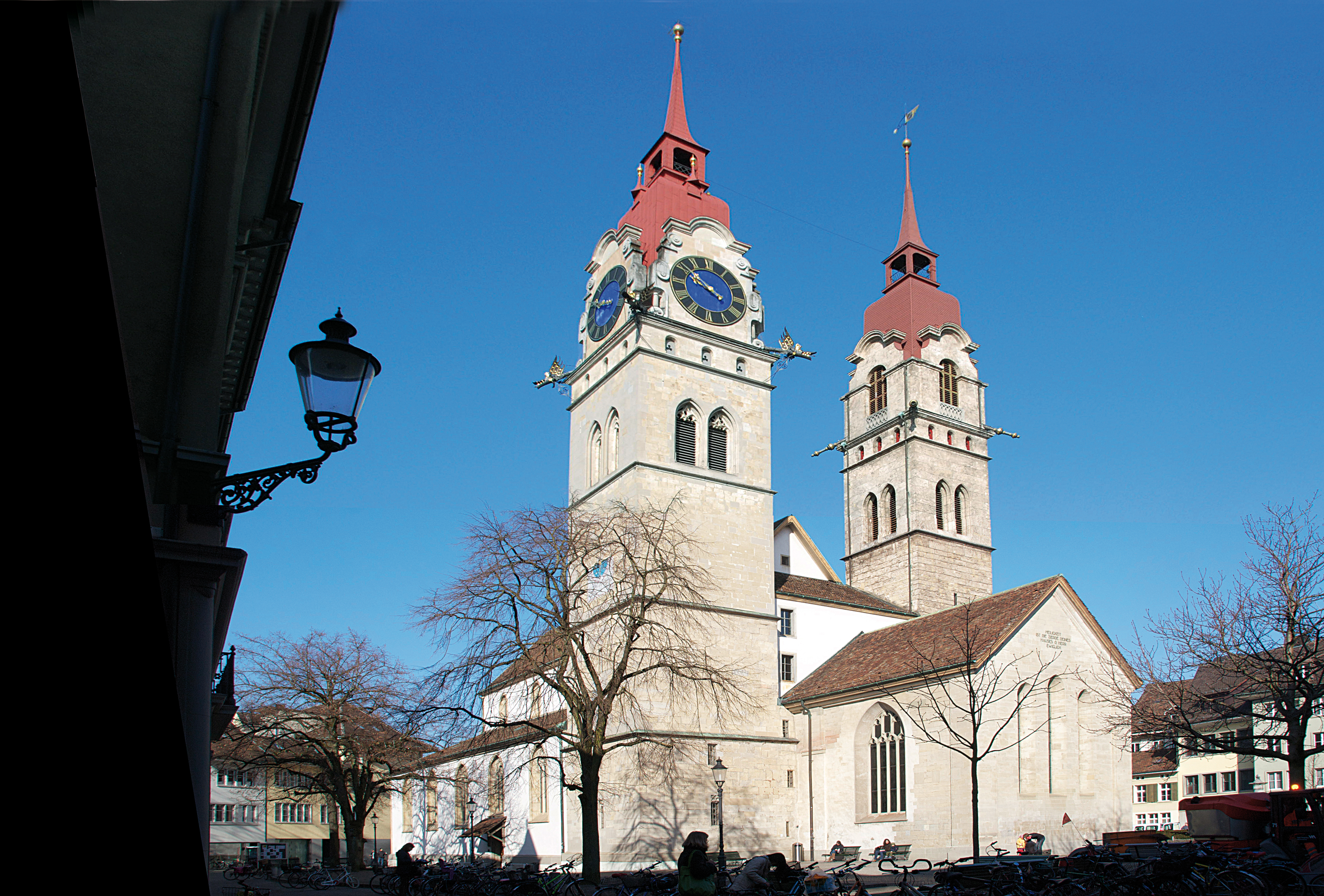 Kirchenplatz Winterthur